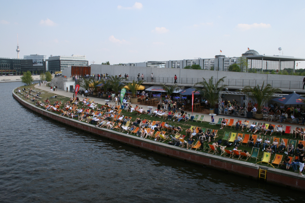 Berlin, Spreeufer in Mitte, near Hauptbahnhof